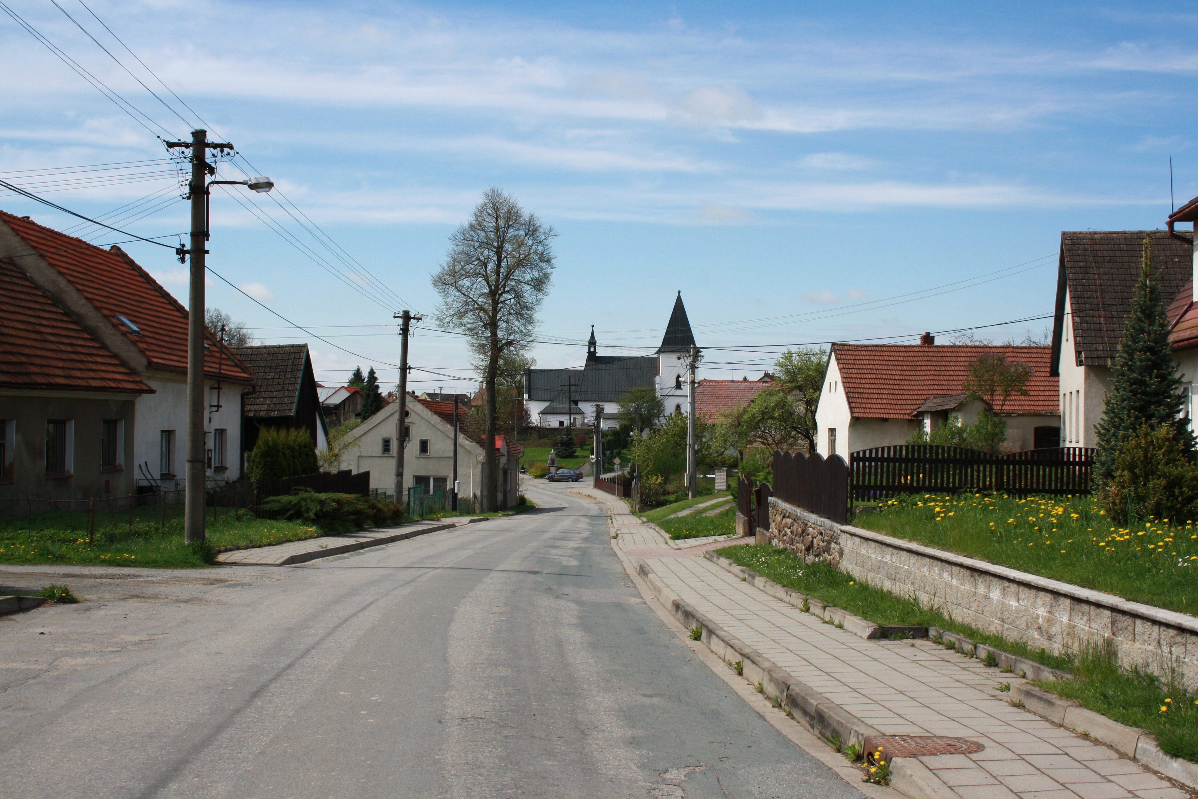 Bukov - pohled od autobusové zastávky ke kostelu This photograph was taken within the scope of the 'Czech Municipalities Photographs' grant. This photograph was taken with a DSLR from WMCZ's Camera grant.